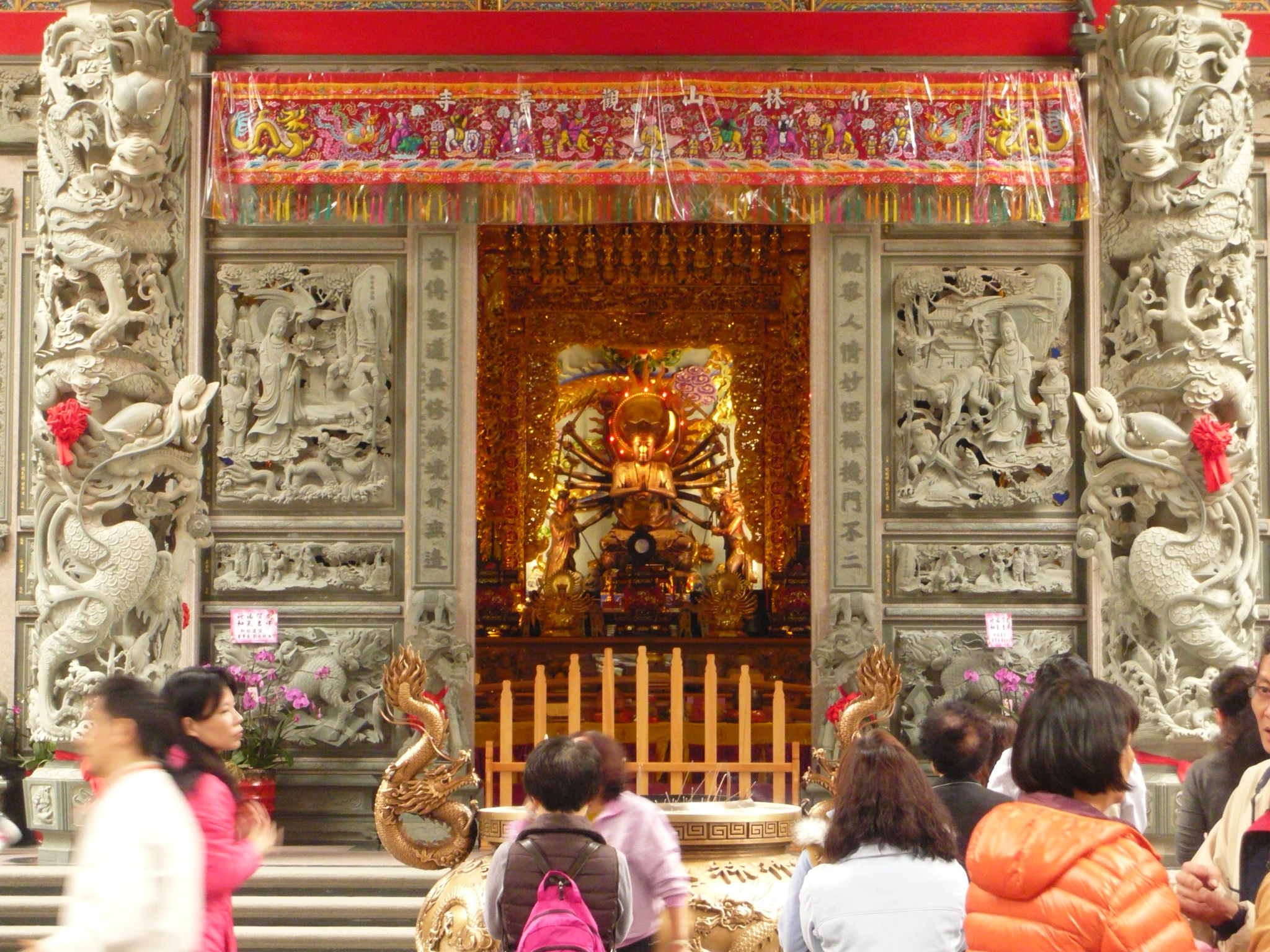 十八手觀音聖像。